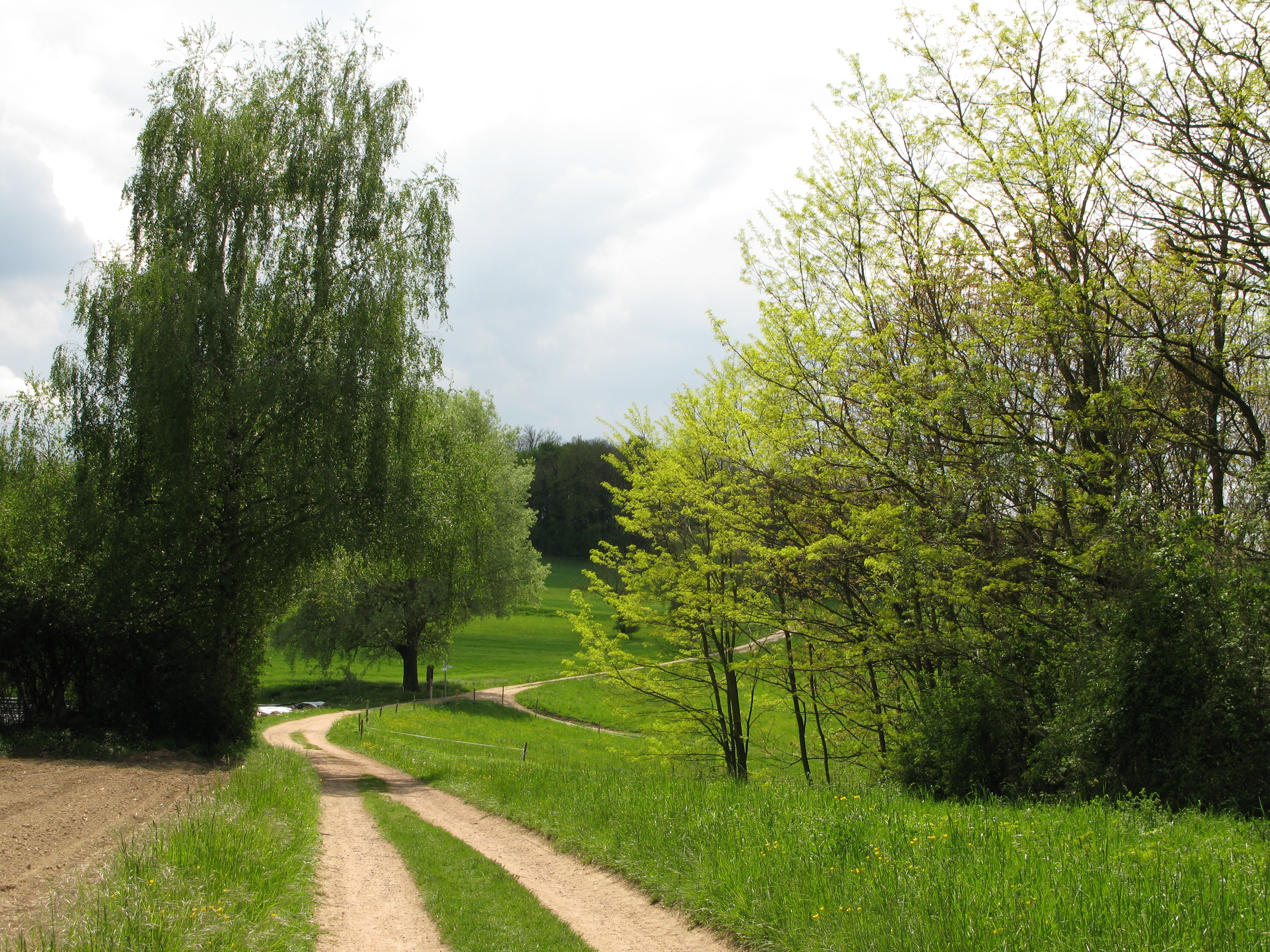 Am Stationenweg bei Bamlach am Fernwanderweg Markgräfler Wiiwegli im Markgräflerland.